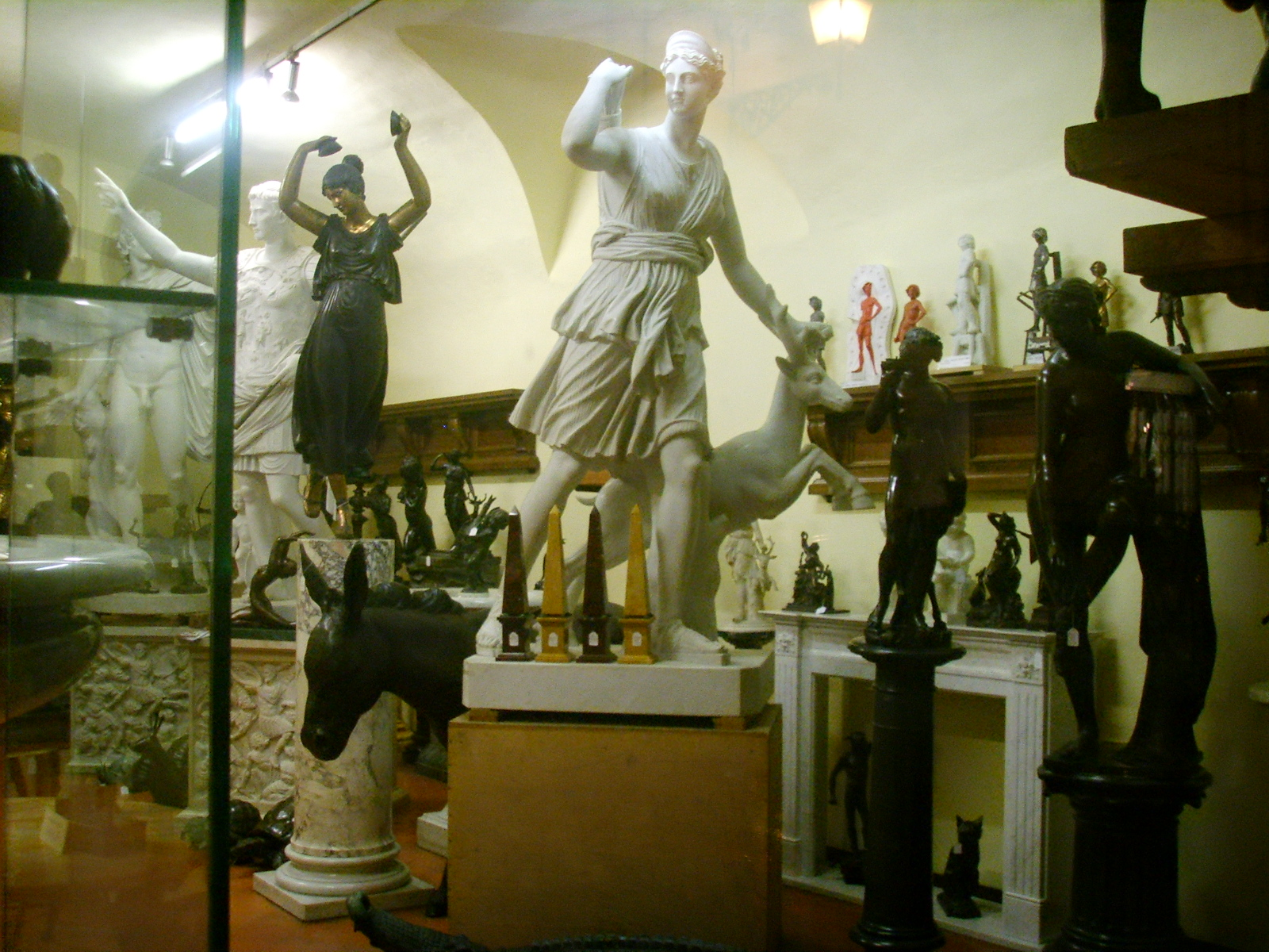 Via de' Fossi Sculpture shop in Florence